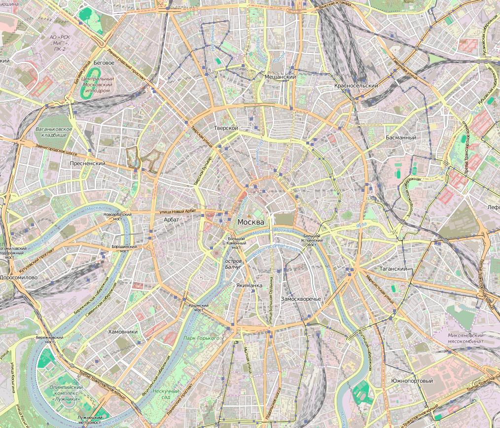 План Центрального административного округа Москвы This map may be incomplete, and may contain errors. Don't rely solely on it for navigation.